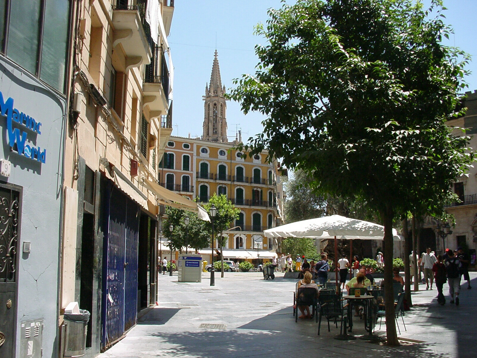 Palma de Mallorca Ansicht